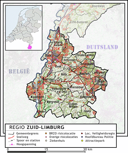 Regio Zuid-Limburg, met indeling van gemeenten (2009) en impressie van het landschap. Door Jan-Willem van Aalst, samengesteld uit publiek beschikbare geo-data: Referentie-ondergrond (kustlijn, steden, wegen) gerasterd uit de OpenStreet Map OSM. ( Inhoud is beschikbaar onder de Creative Commons Attribution-ShareAlike 3.0 license. Referentie-ondergrond op water bewerkt vanuit Gebruik is vrij met bronvermelding NLR en ESA. Vectorgrenzen van gemeenten en regio's vrij ter beschikking gesteld met dank aan cartografen van brandweerregio's Hollands-Midden en IJssel-Vecht; gerasterd in Photoshop. BRZO locaties op basis van de provinciale risicokaart, Defensie locaties op basis van de lijst op Overige kenmerken op de kaart: eigen tekenwerk van Jan-Willem van Aalst, op basis van gerasterde gemeentegrenzen.